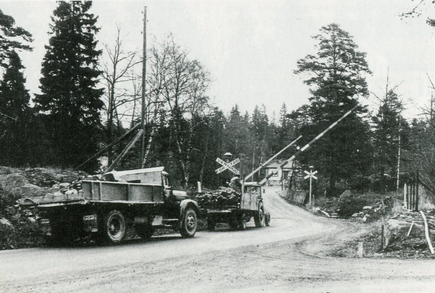 Trångsundsvägen korsning med Nynäsbanan